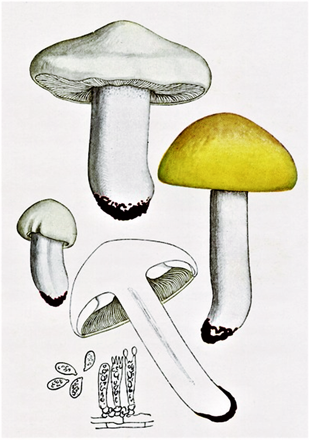 Giacomo Bresadola: Tricholoma georgii (Carl von Linné|L. , 1753) Quél. (1872), heute Calocybe gambosa (Fr., 1821), Donk (1962)